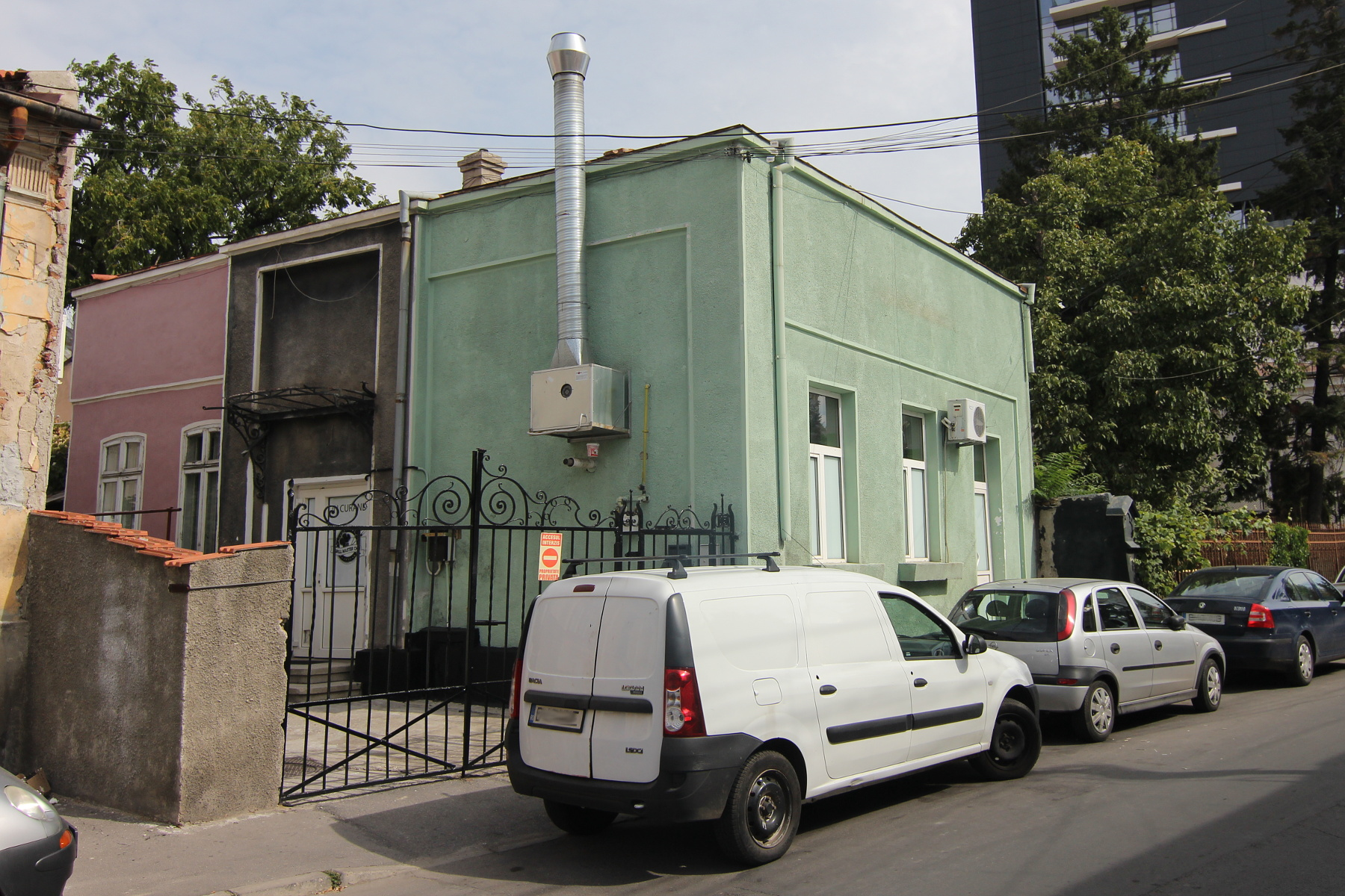 Casă pe Str Robescu